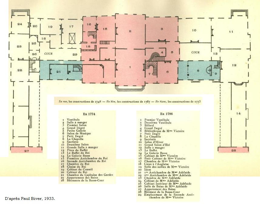 Distribution de Bellevue avant et après les agrandissements.